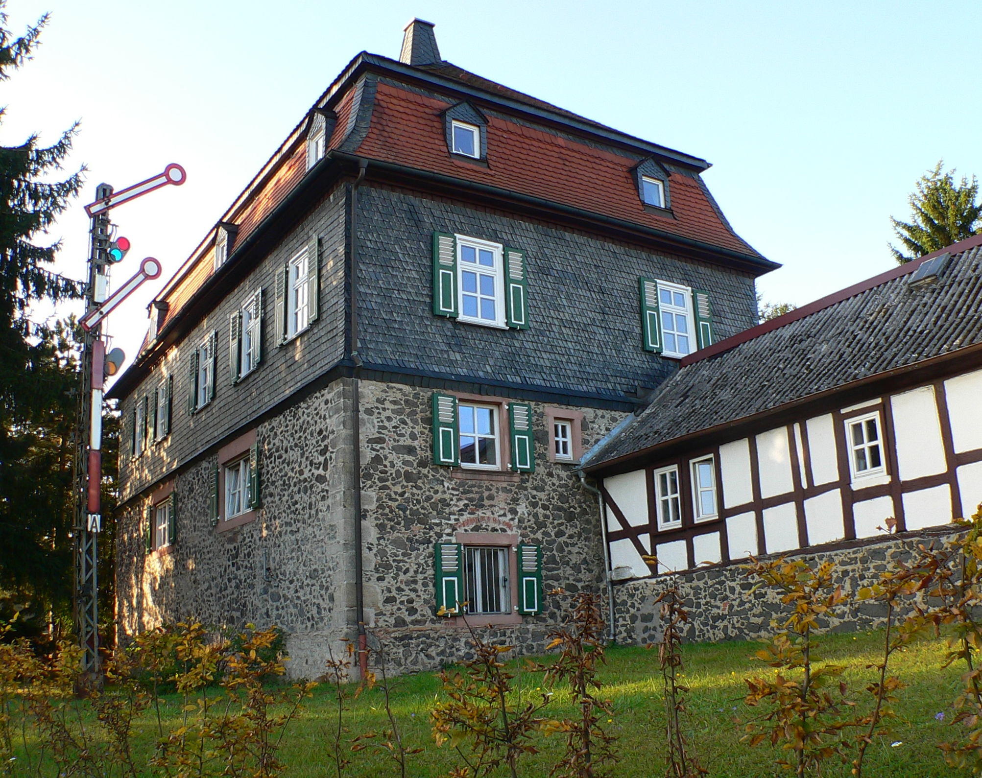 Herrenhaus anstelle der ehemaligen Hofburg in Alten-Buseck ist eine Ortschaft der Gemeinde Buseck im Landkreis Gießen im Bundesland Hessen, Deutschland